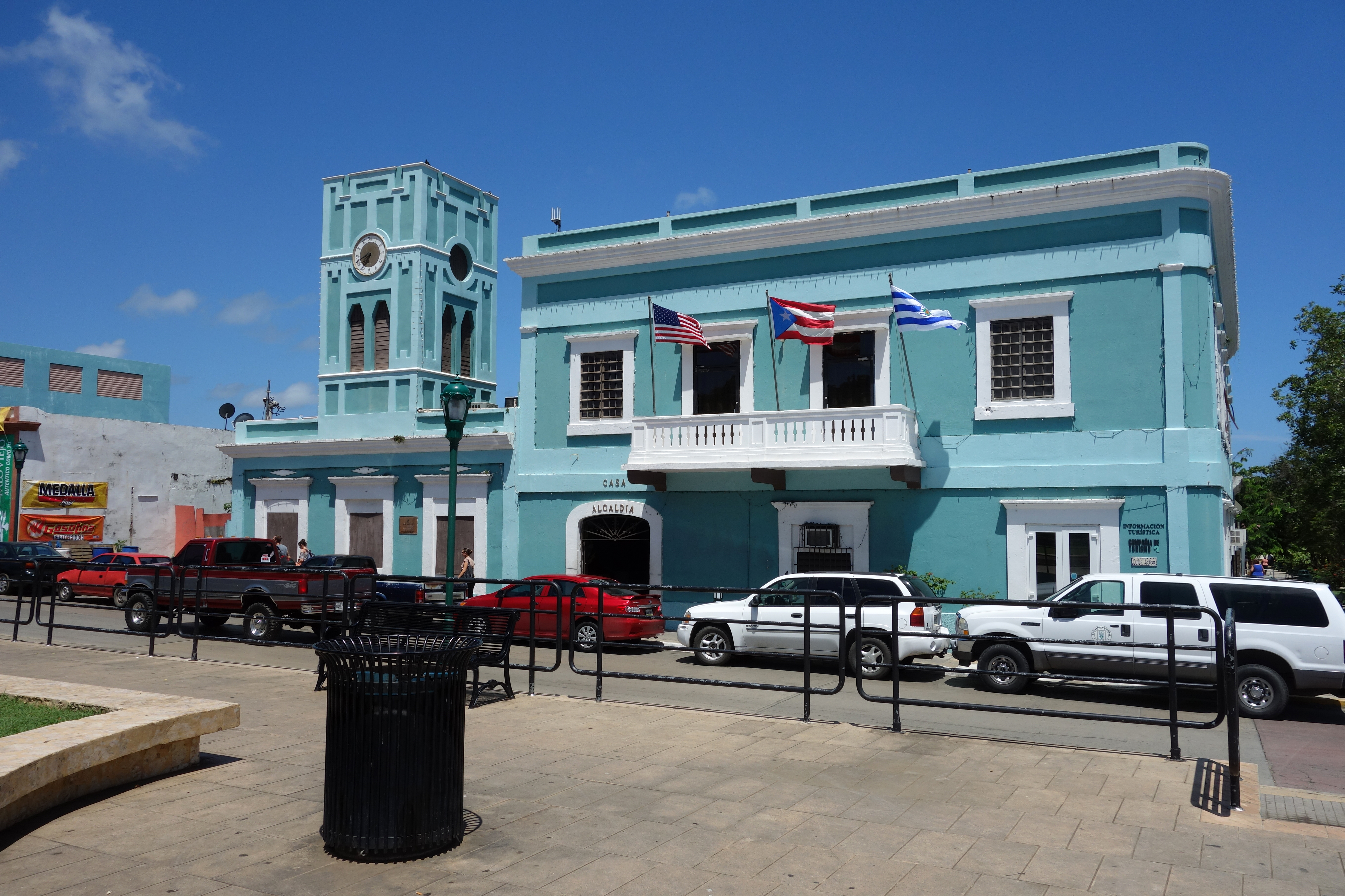 Rådhuset i Isabel Segunda på øya Vieques i Puerto Rico